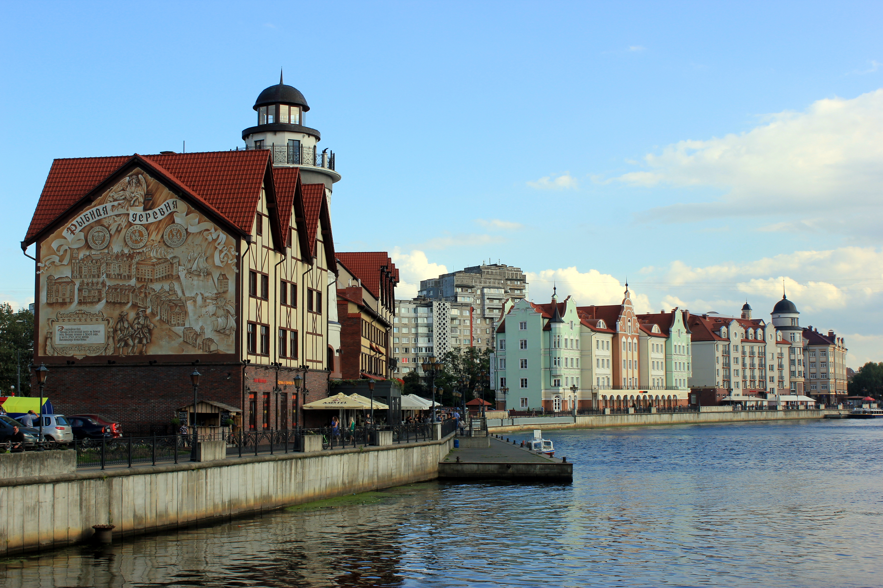 Das neu errichtete "Fischdorf" in der Innenstadt von Kaliningrad.